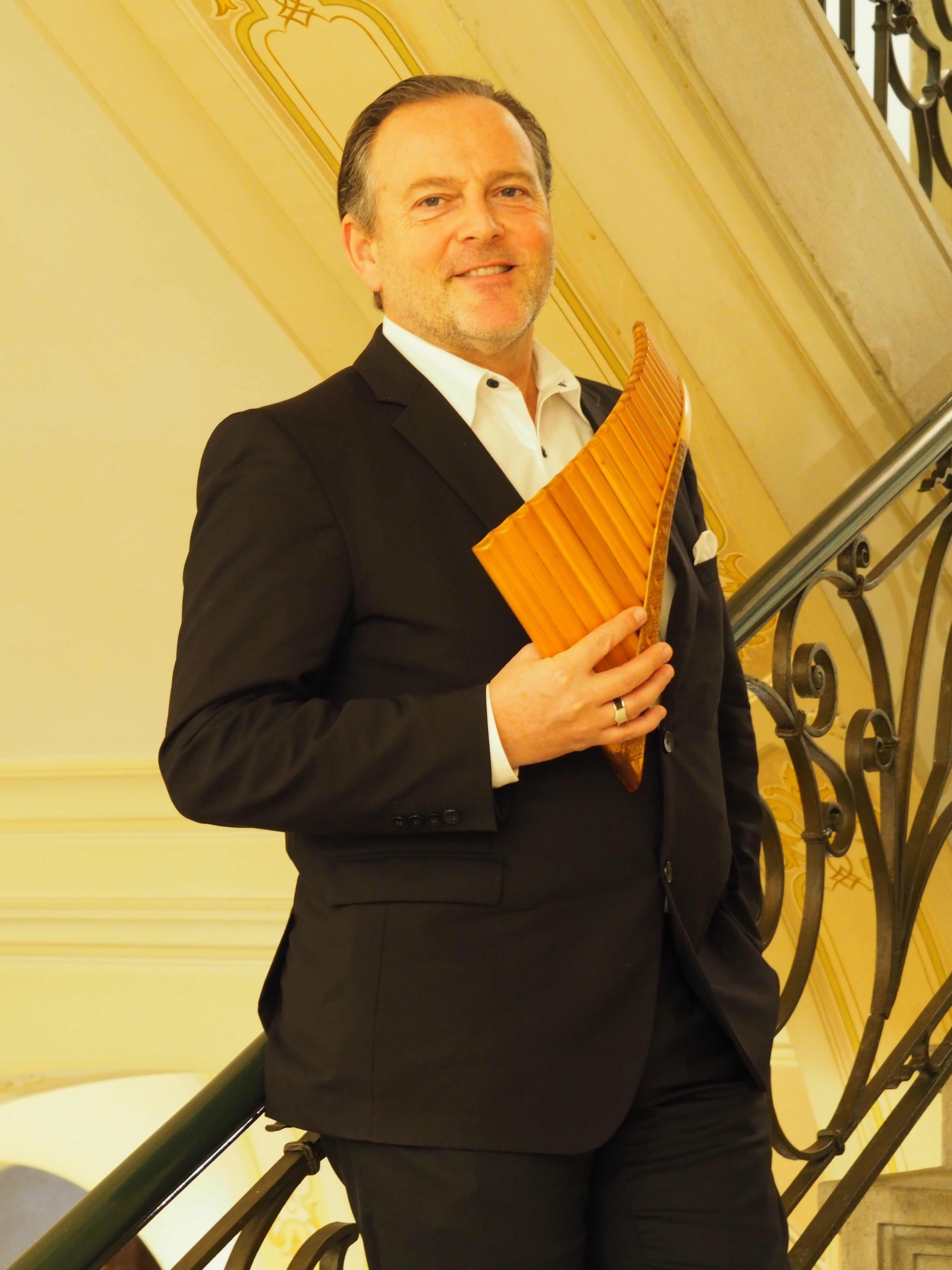 Urban Frey, der erste Panflötist der Schweiz mit Lehr- und Konzertdiplom.